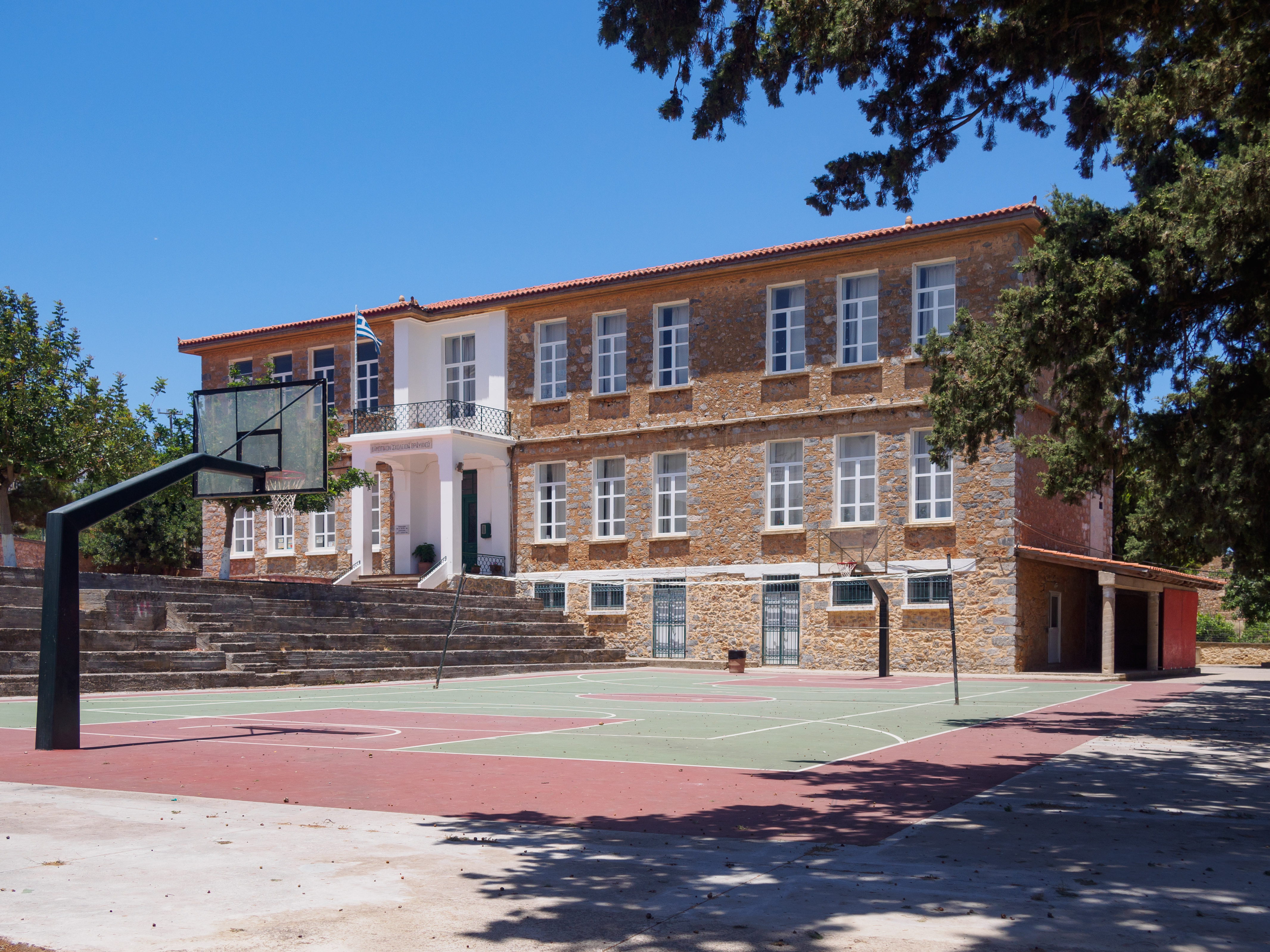 Δημοτικό Σχολείο Θραψανού«Δημοτικό Σχολείο Θραψανού»